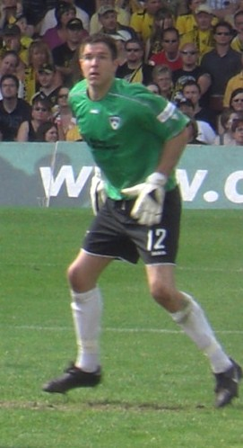 Thorsten Stuckmann (Torwart von Alemannia Aachen) beim Spiel gegen den FC St. Pauli in Hamburg in der Saison 2007/2008.